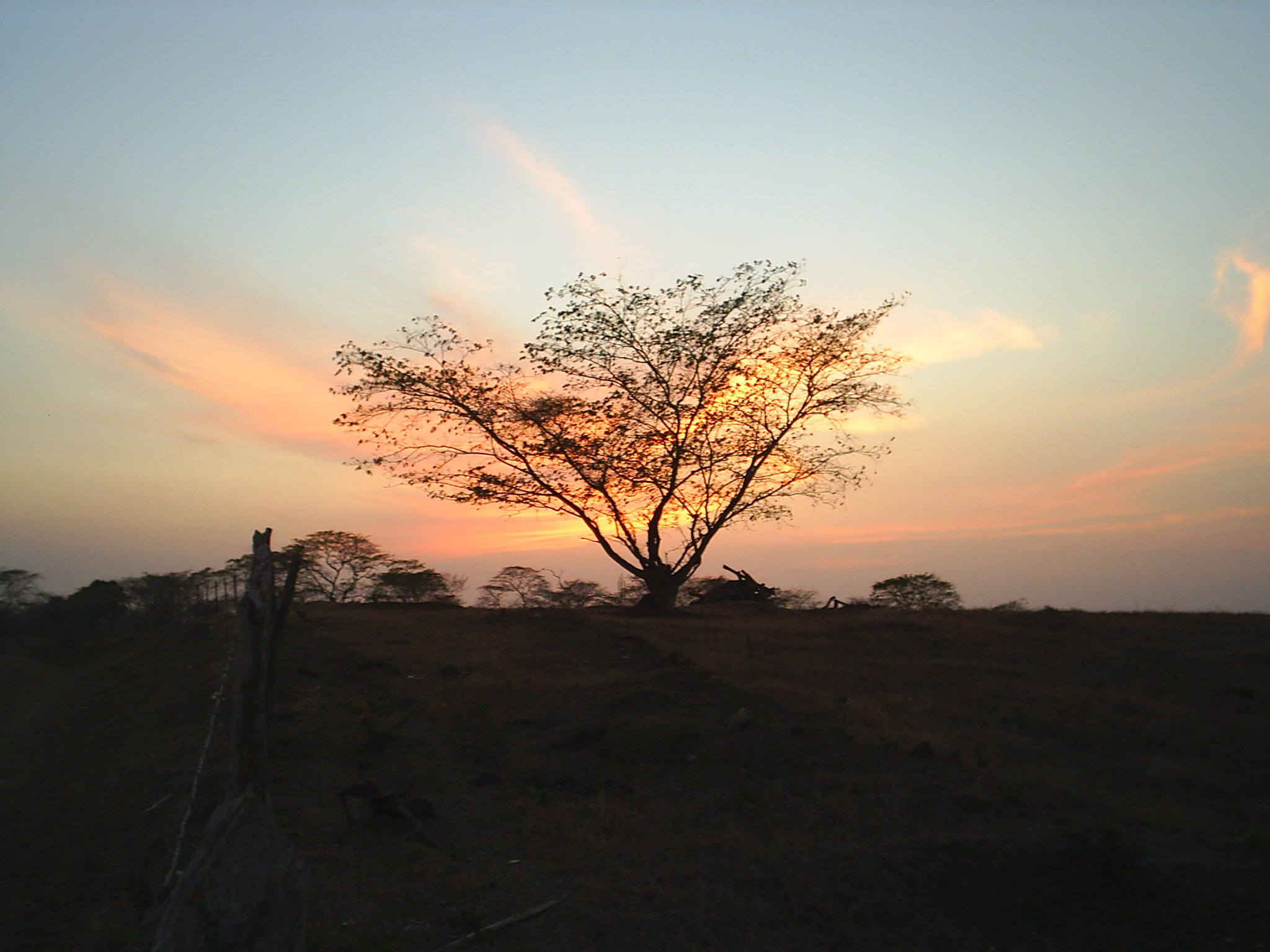 Sunset in Punta de Piedras, Magdalena, Colombia